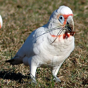 Bird, Long-billed Corella, Cacatua tenuirostris